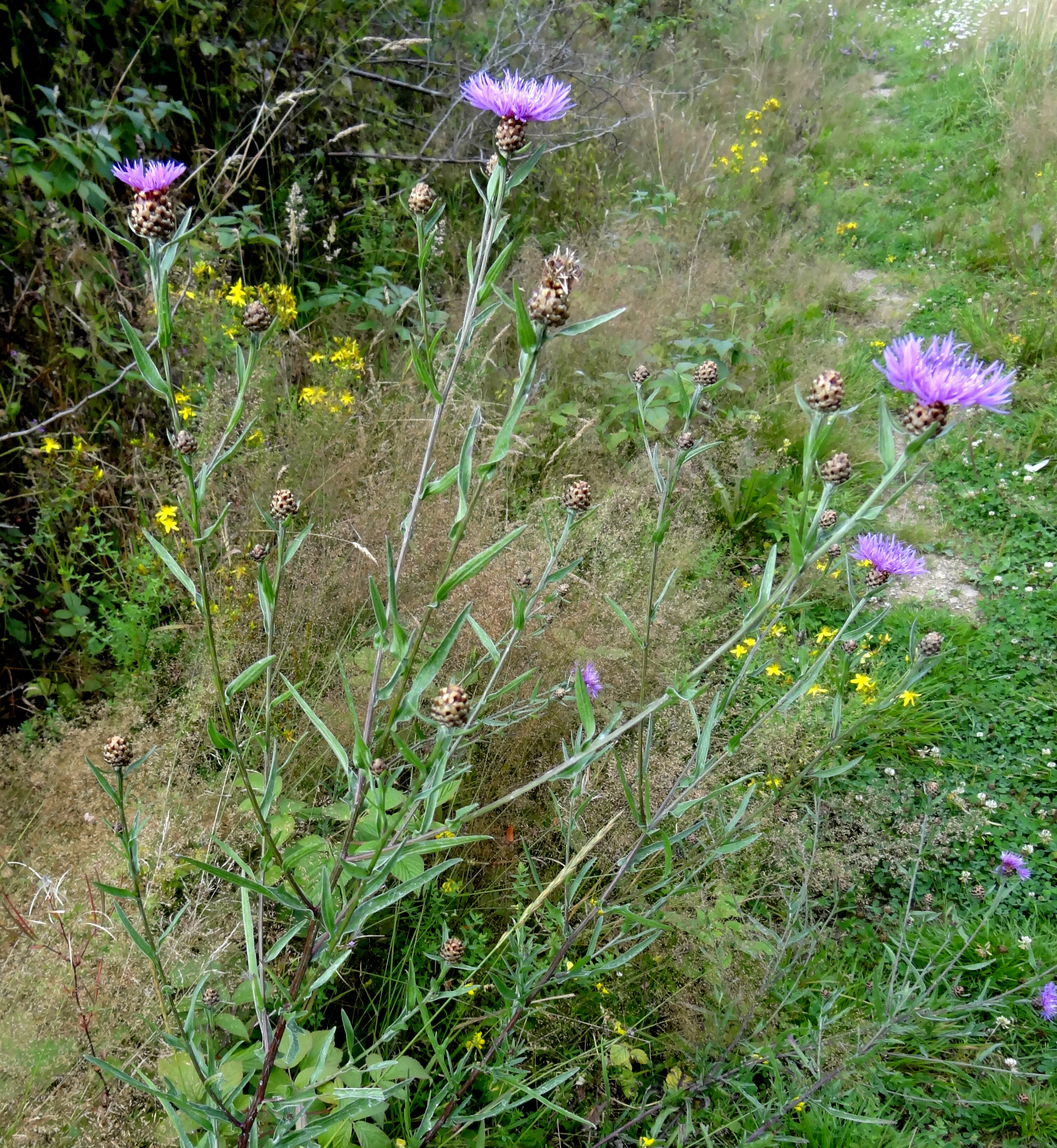 Gemeine Flockenblume, Asteraceae, Deutschland, Bayern, Oberfranken, Selbitz Foto: U.Schmidt, 11.VIII.2012